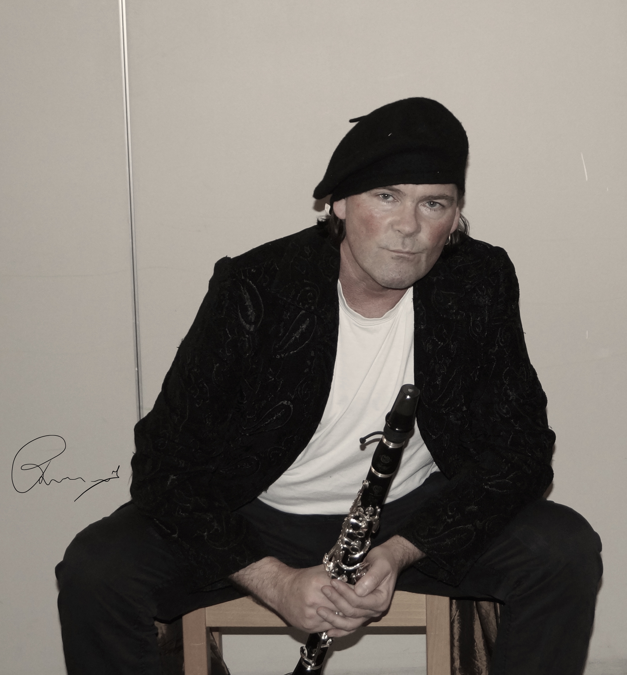 Foto: Vigulf Musicproduction 2019